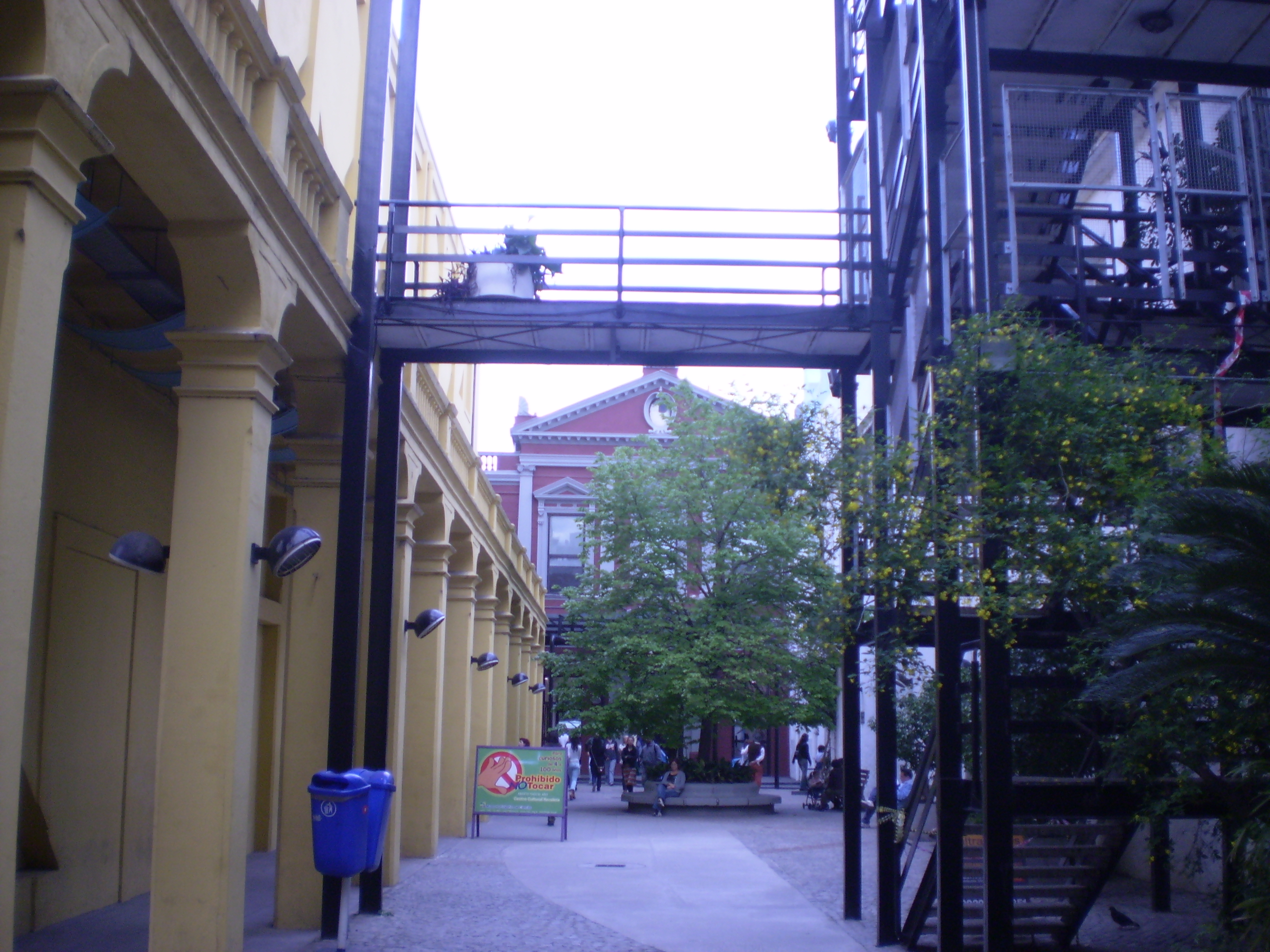 Centro Cultural Recoleta (Buenos Aires, Argentina)